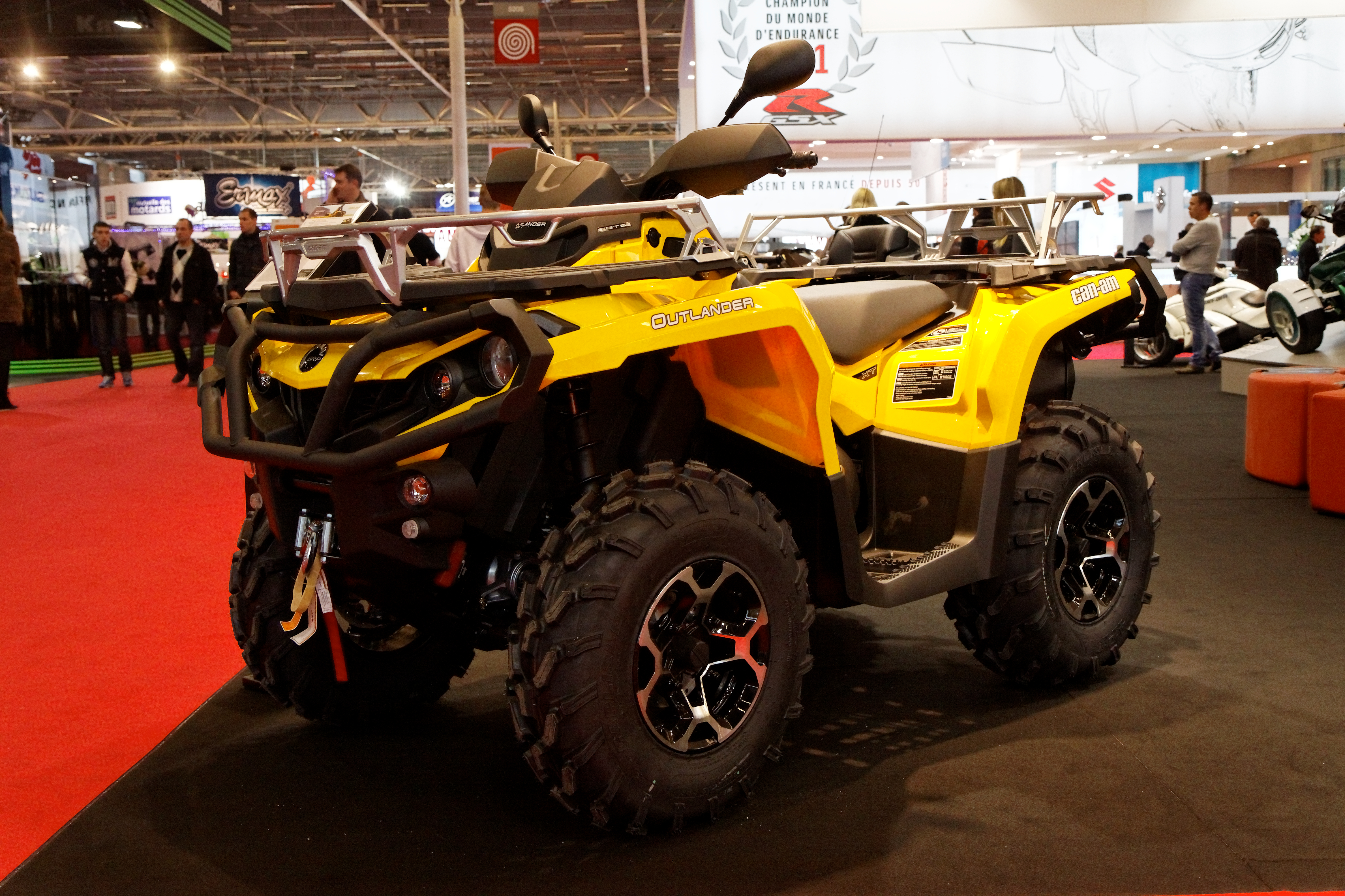 Can-Am - Outlander